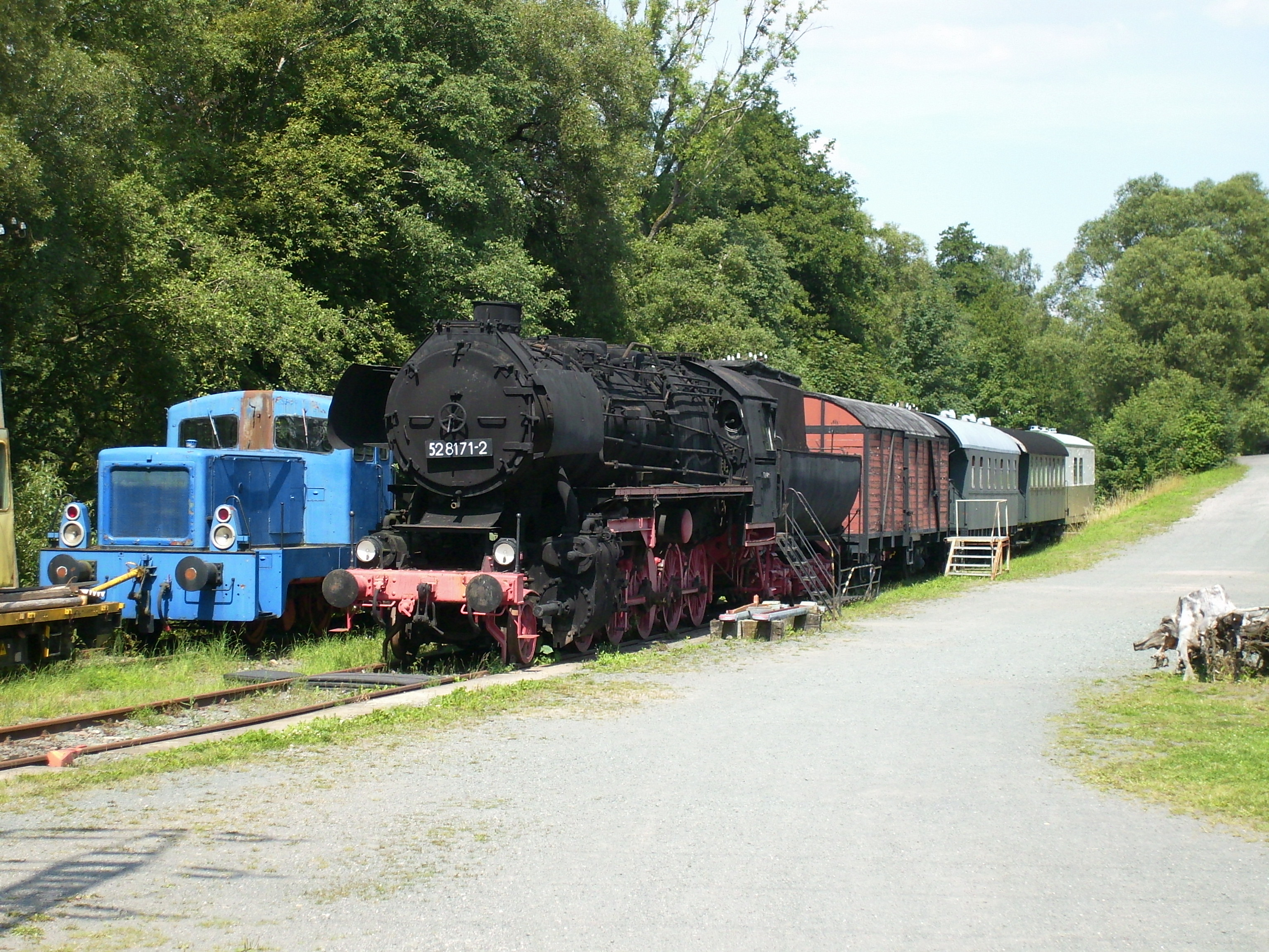 Lohmühlenmuseum Georgenthal